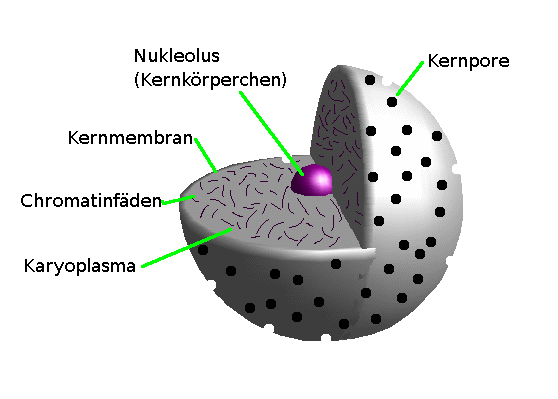 Zellkern